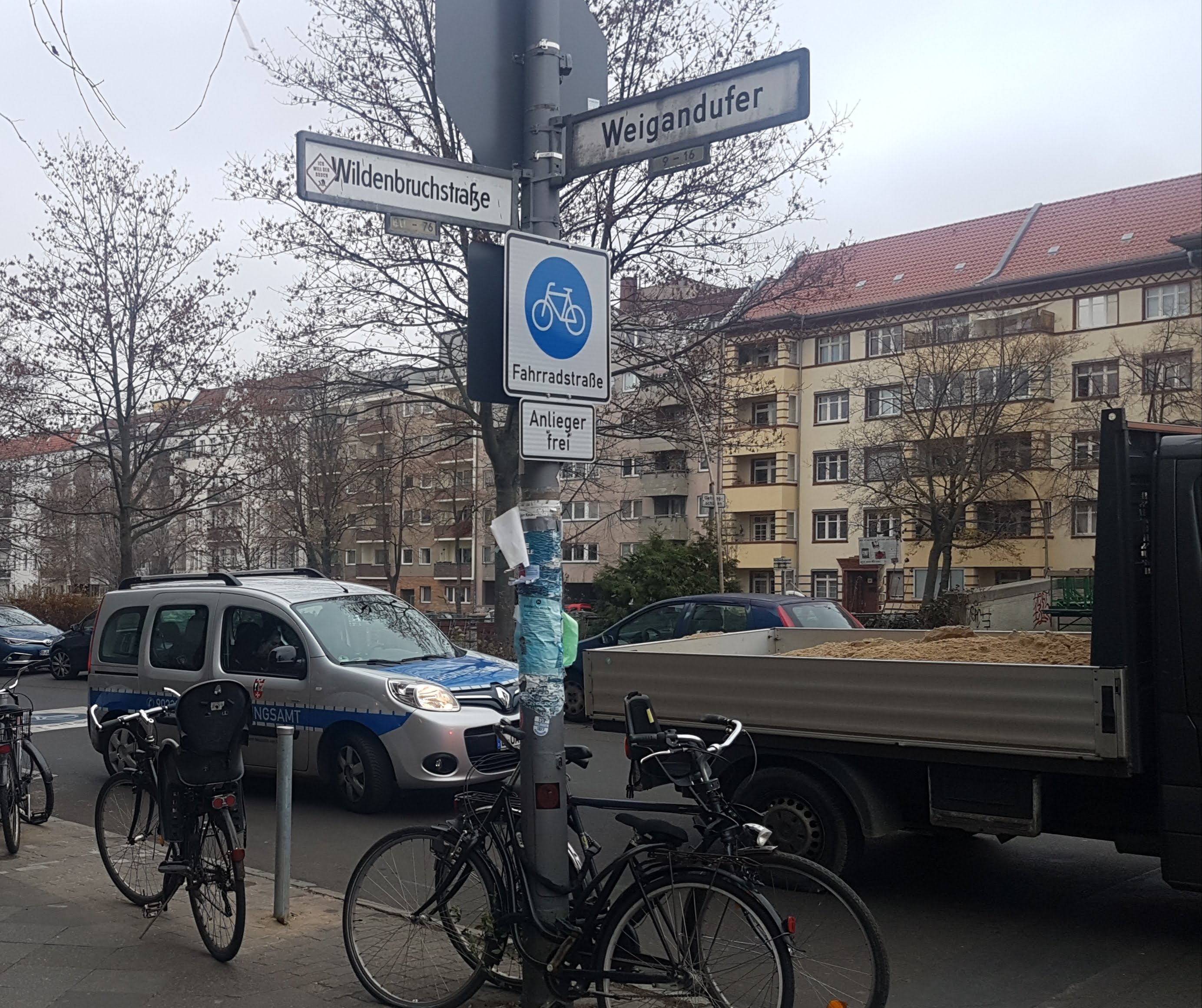 Seit 2018 ist das Weigandufer als Fahrradstraße ausgewiesen